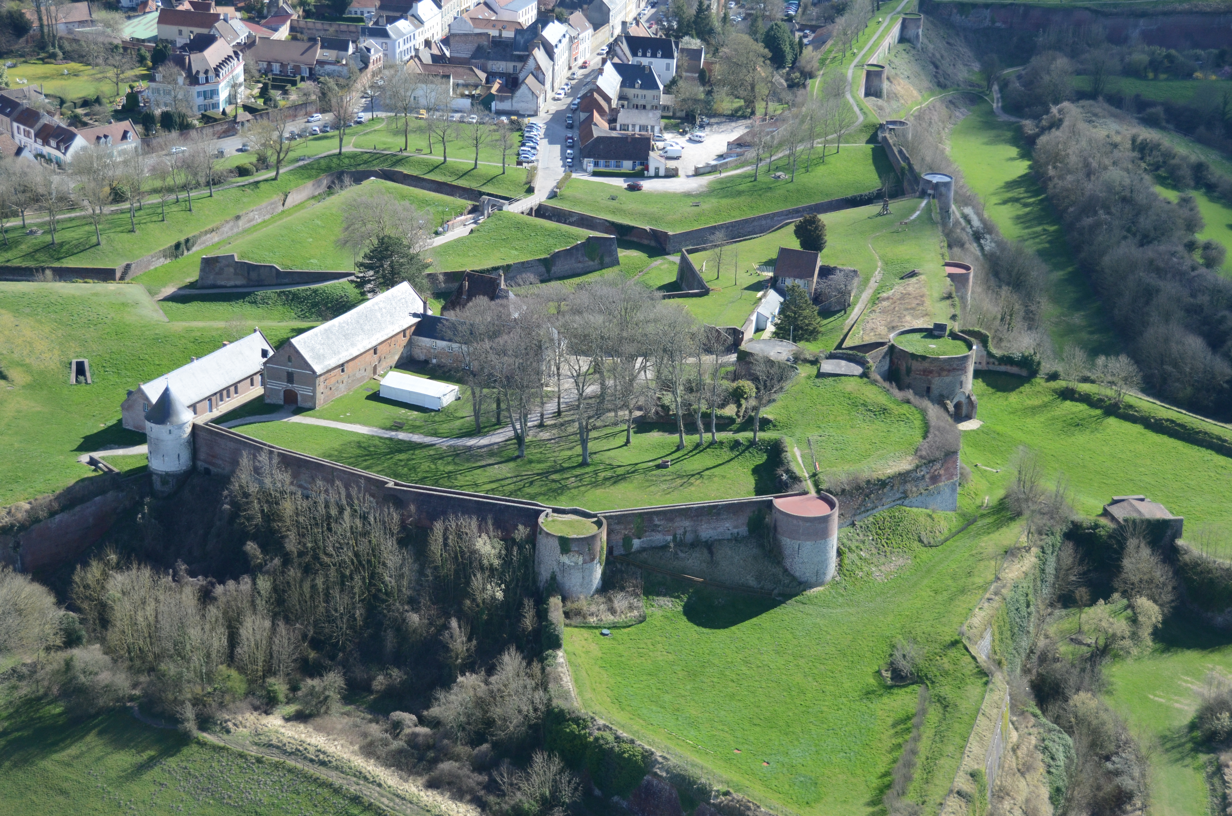 Vue aérienne de la citadelle de Montreuil-sur-Mer (Pas-de-Calais) XIIIe -XIXe siècle